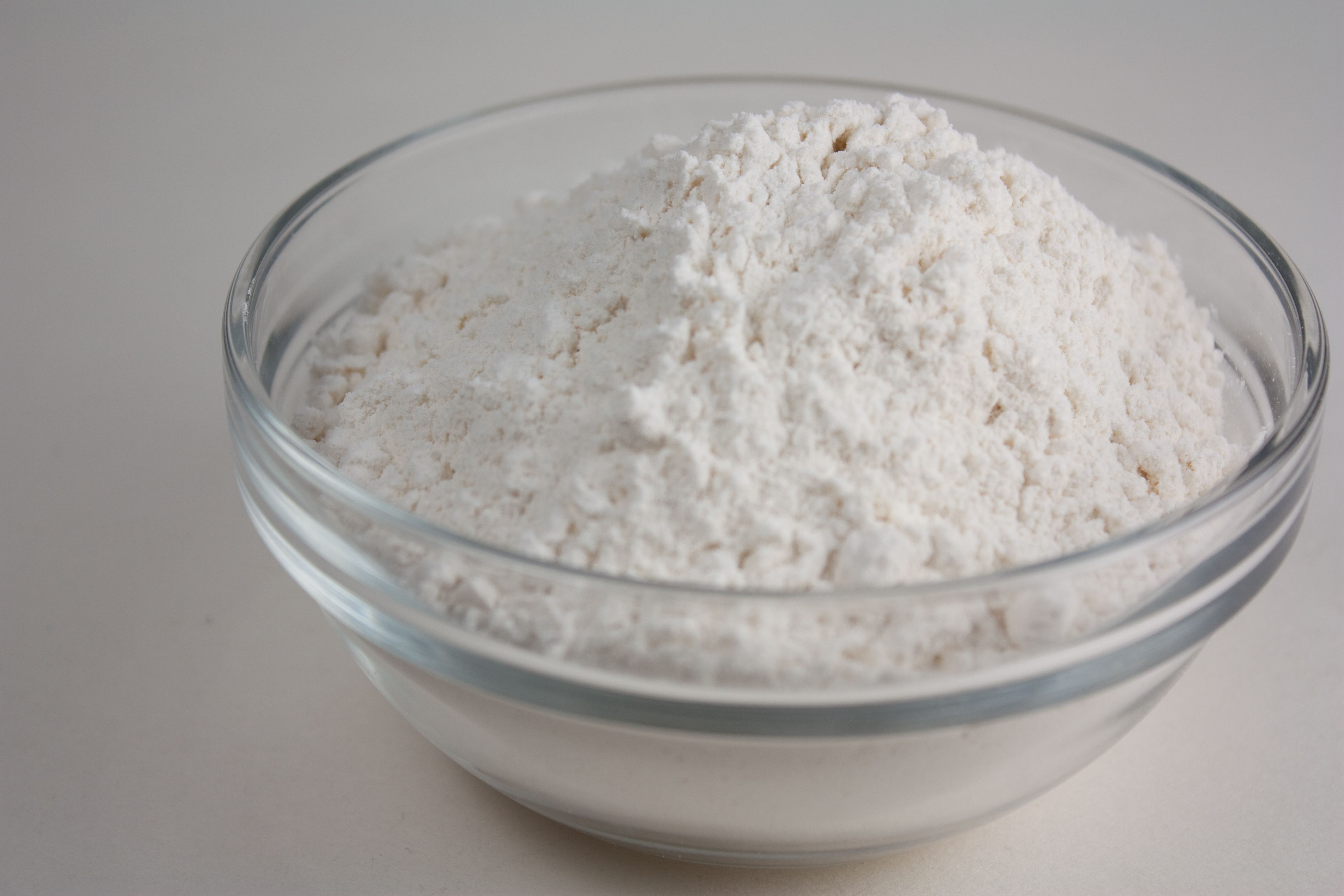 All-Purpose Flour